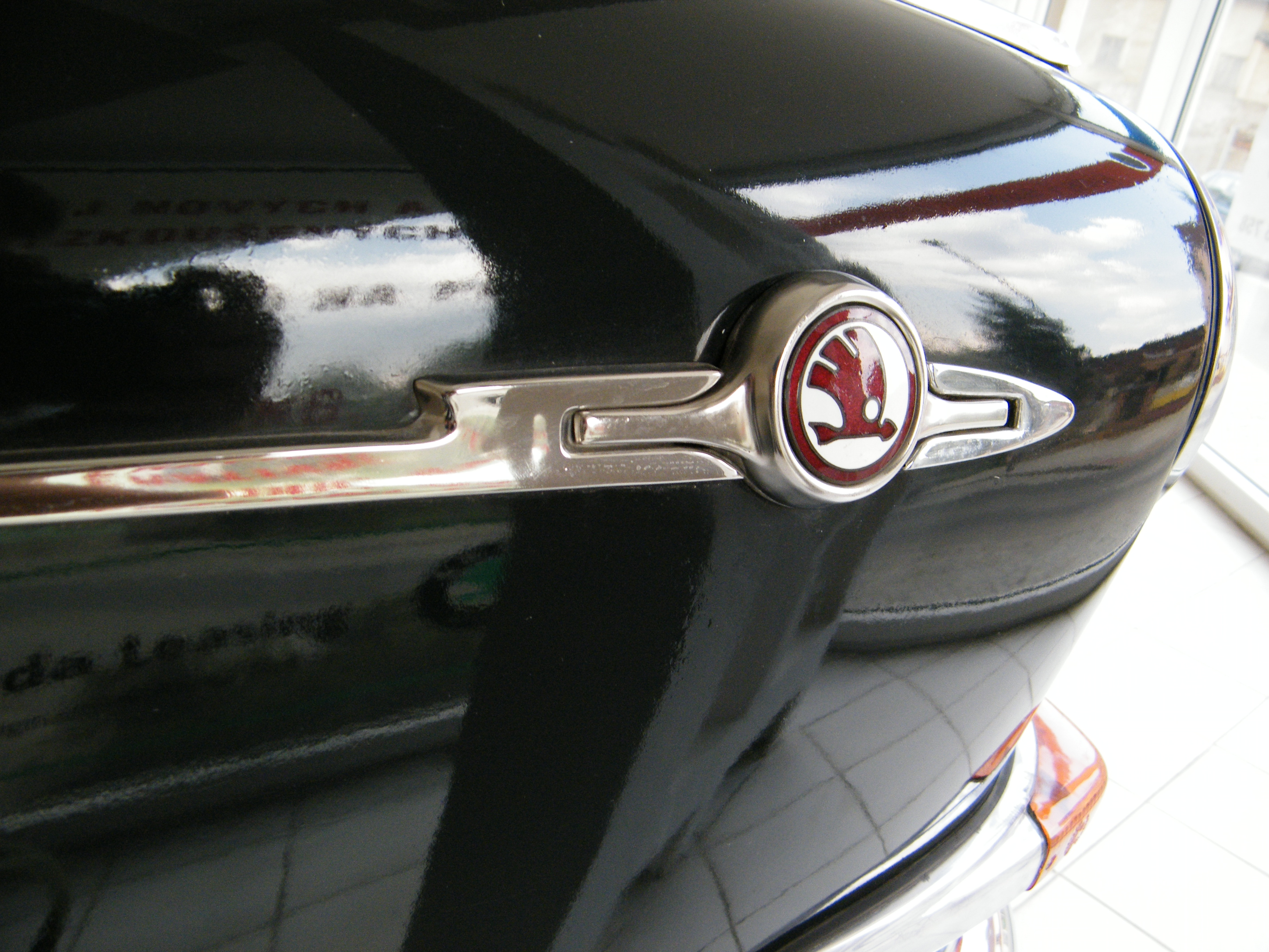 Škoda 1000 MBX de Luxe